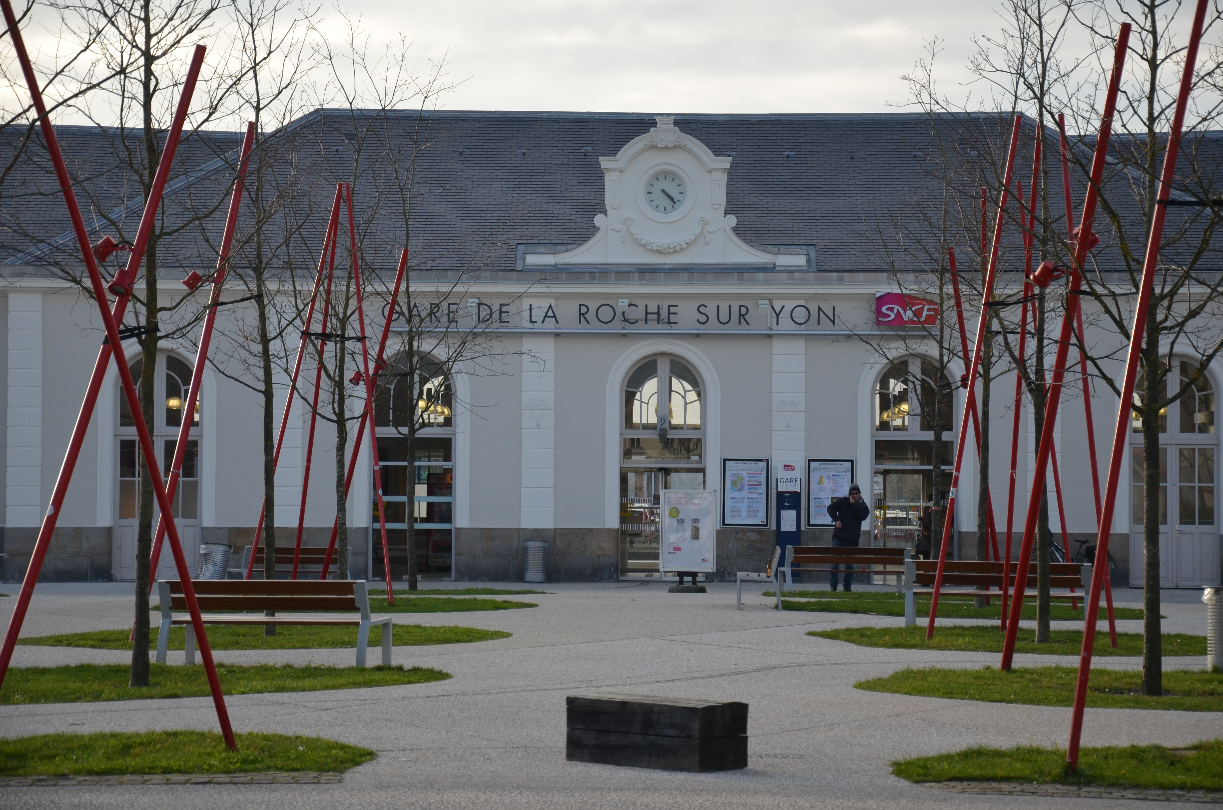 Bâtiment voyageurs et parvis de la gare de La Roche-sur-Yon.